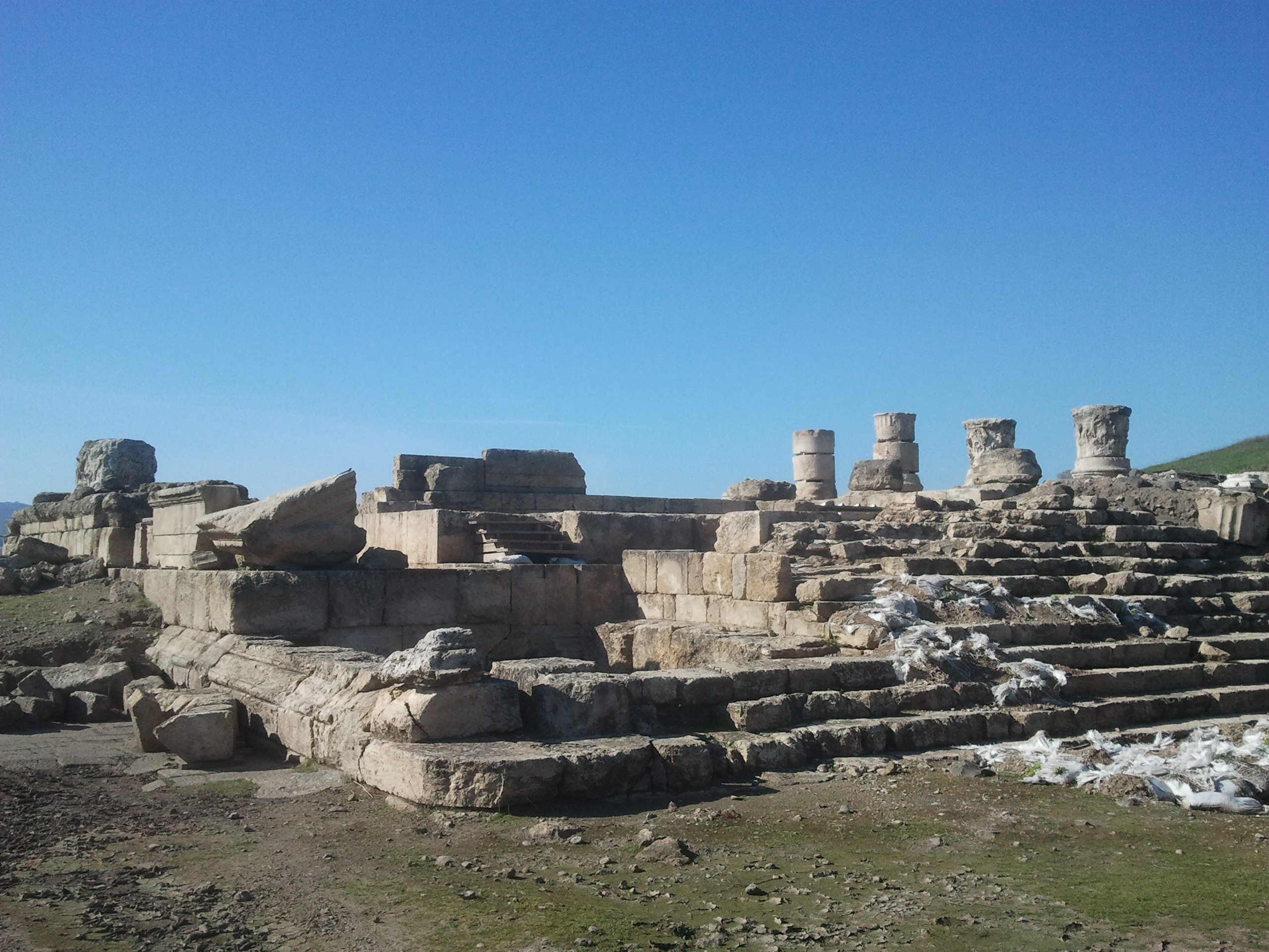 חורבת עומרית הוא אתר ארכאולוגי שבו שרידי מקדש רומי שבנה הורדוס לכבודו של המלך אוגוסטוס בבניאס. האתר שוכן למרגלות הגולן, ליד היישוב שאר ישוב